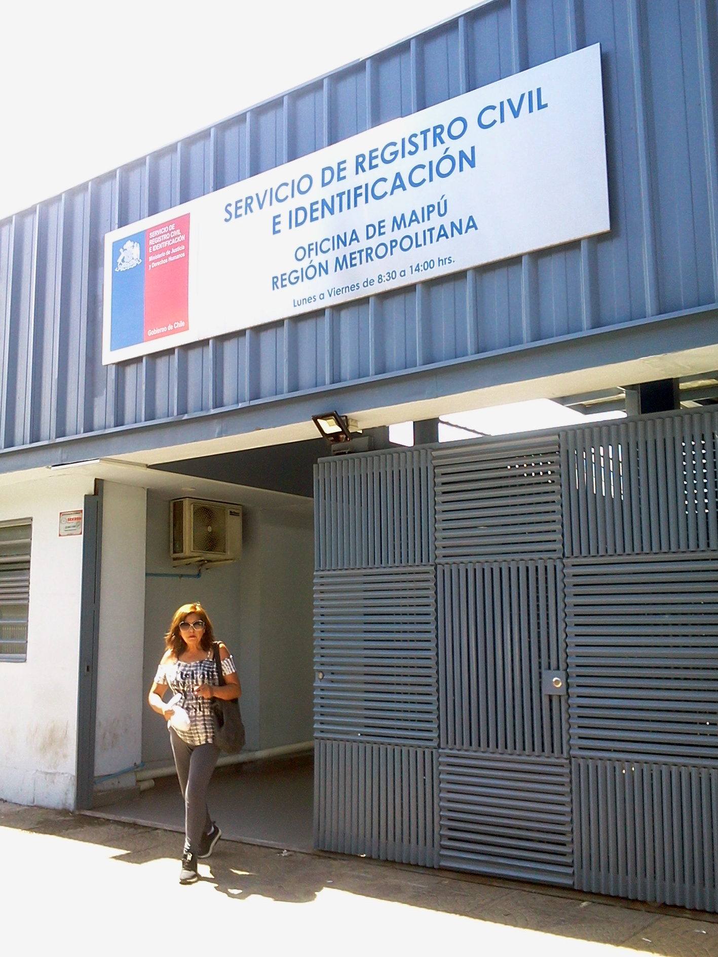 La oficina del Servicio de Registro Civil e Identificación en la comuna de Maipú. Ubicada en calle Alberto Llona 1585. Horario de atención: lunes a viernes de 8:30 a 14:00 hrs.